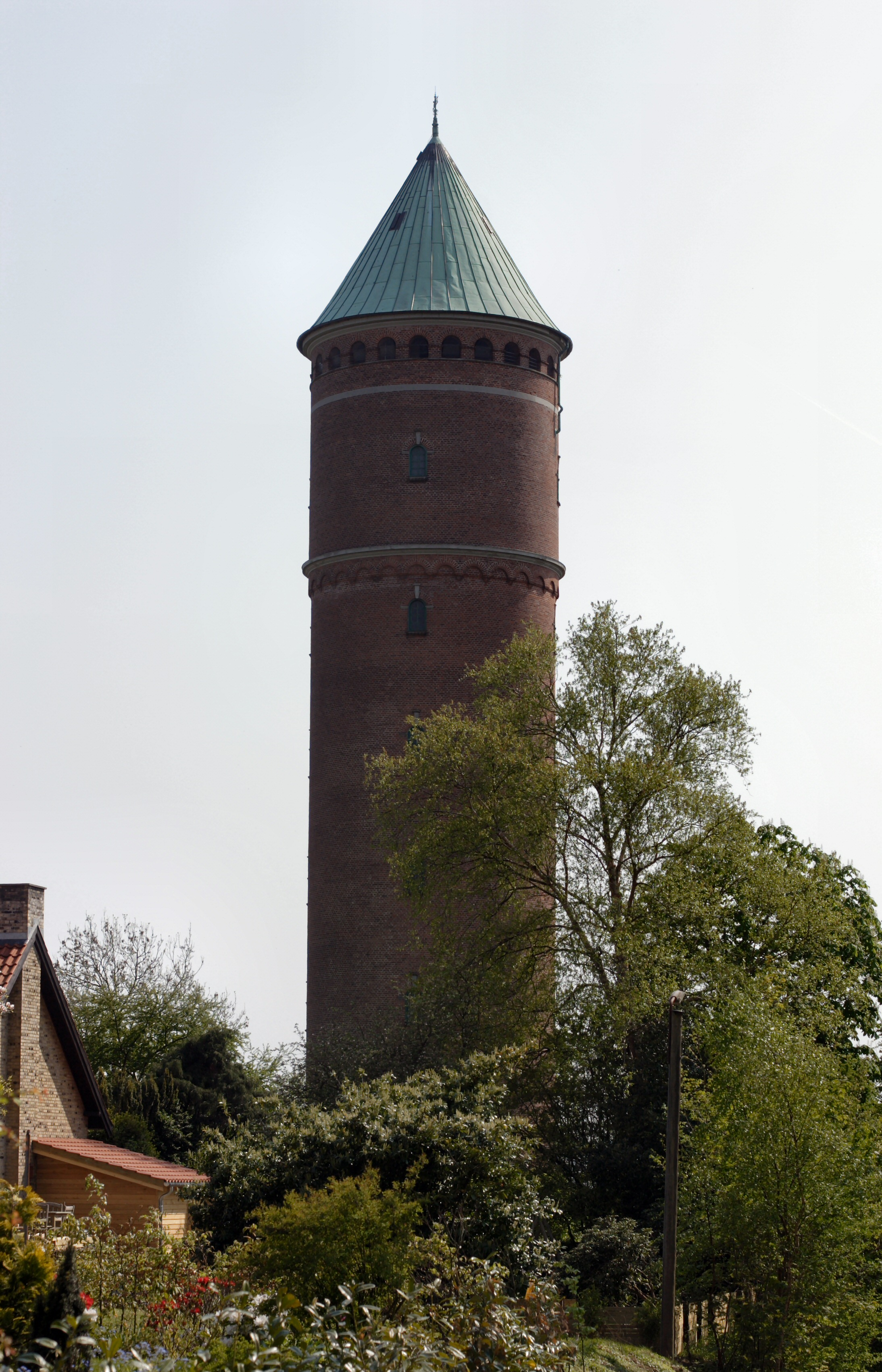 Det Røde Vandtårn set fra Kløften i Haderselv